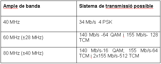 Taula de relació d'ample de banda amb sistema de transmisió en modulacions digitals.